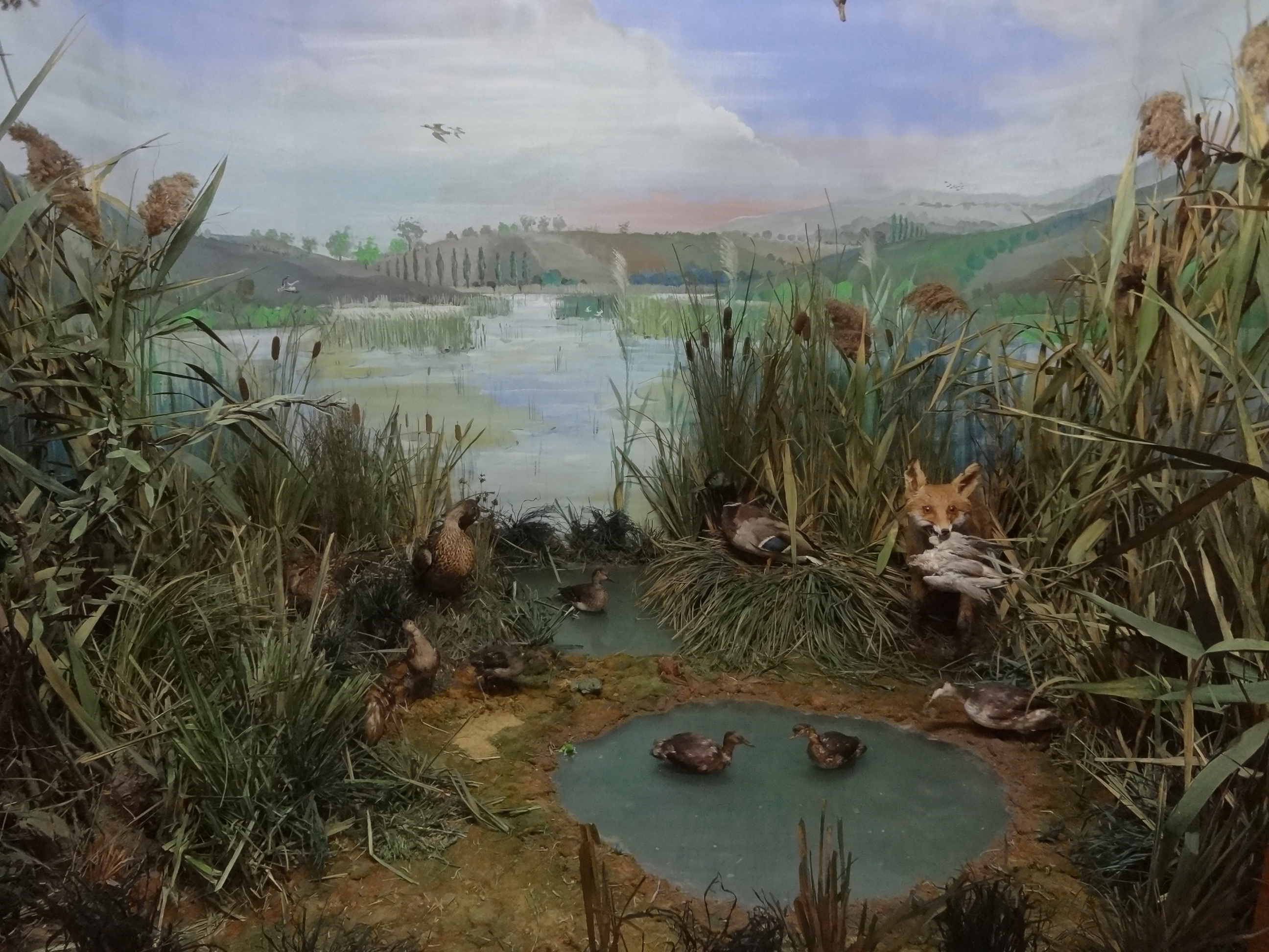 Falticeni musee mihai bacescu 34